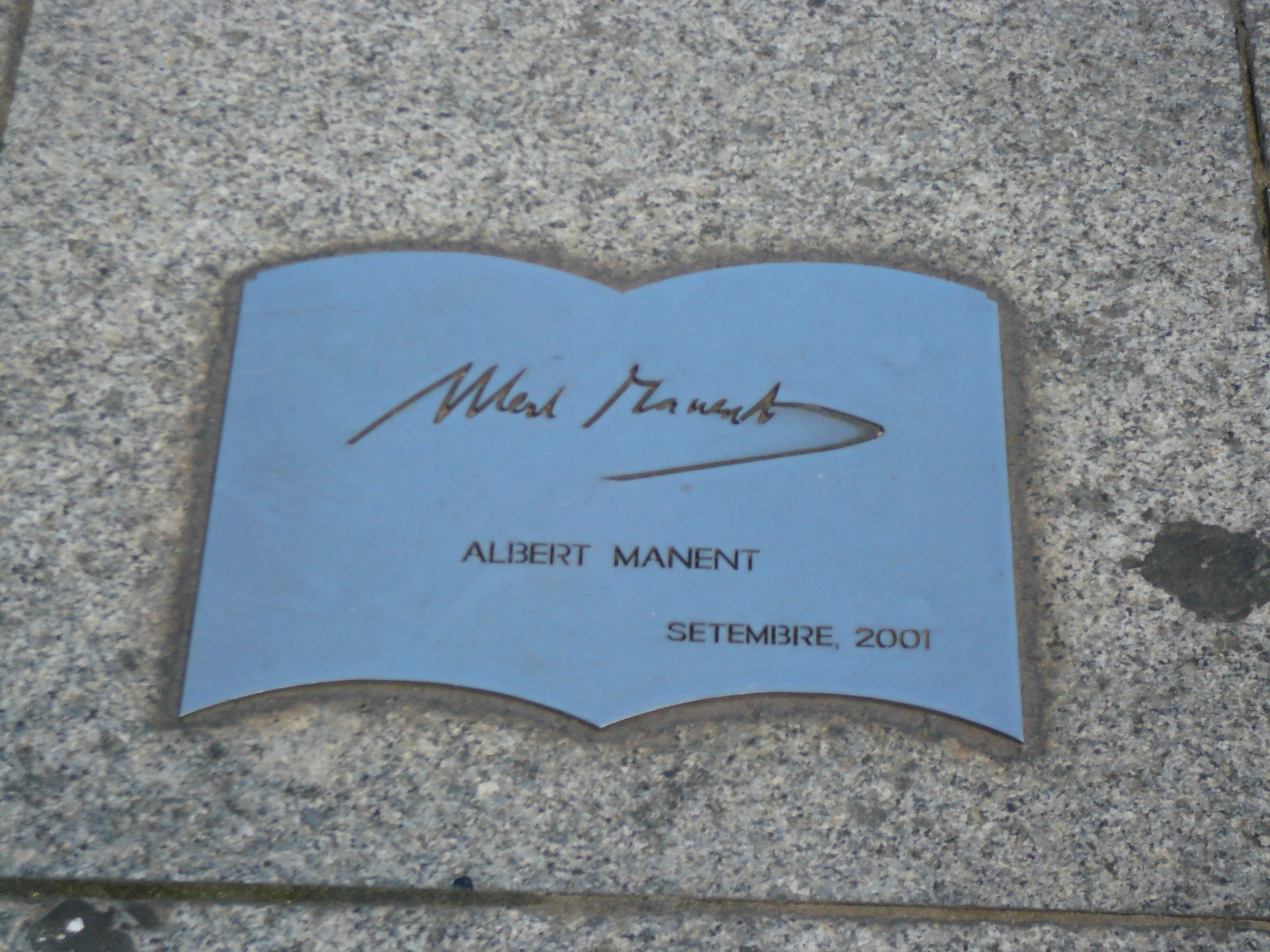 Monument al Llibre, Saltamartí. Gran Via de les Corts Catalanes amb pg. de Gràcia (Barcelona). Escultor: Joan Brossa, signada, amb la col·laboració de Josep Pla-Narbona. Material: planxa pintada d'acer inoxidable -originalment d'acer- sobre base d'acer inoxidable i de granit gris. 1994. 34″ N, 2° 10′ 05.05″ E